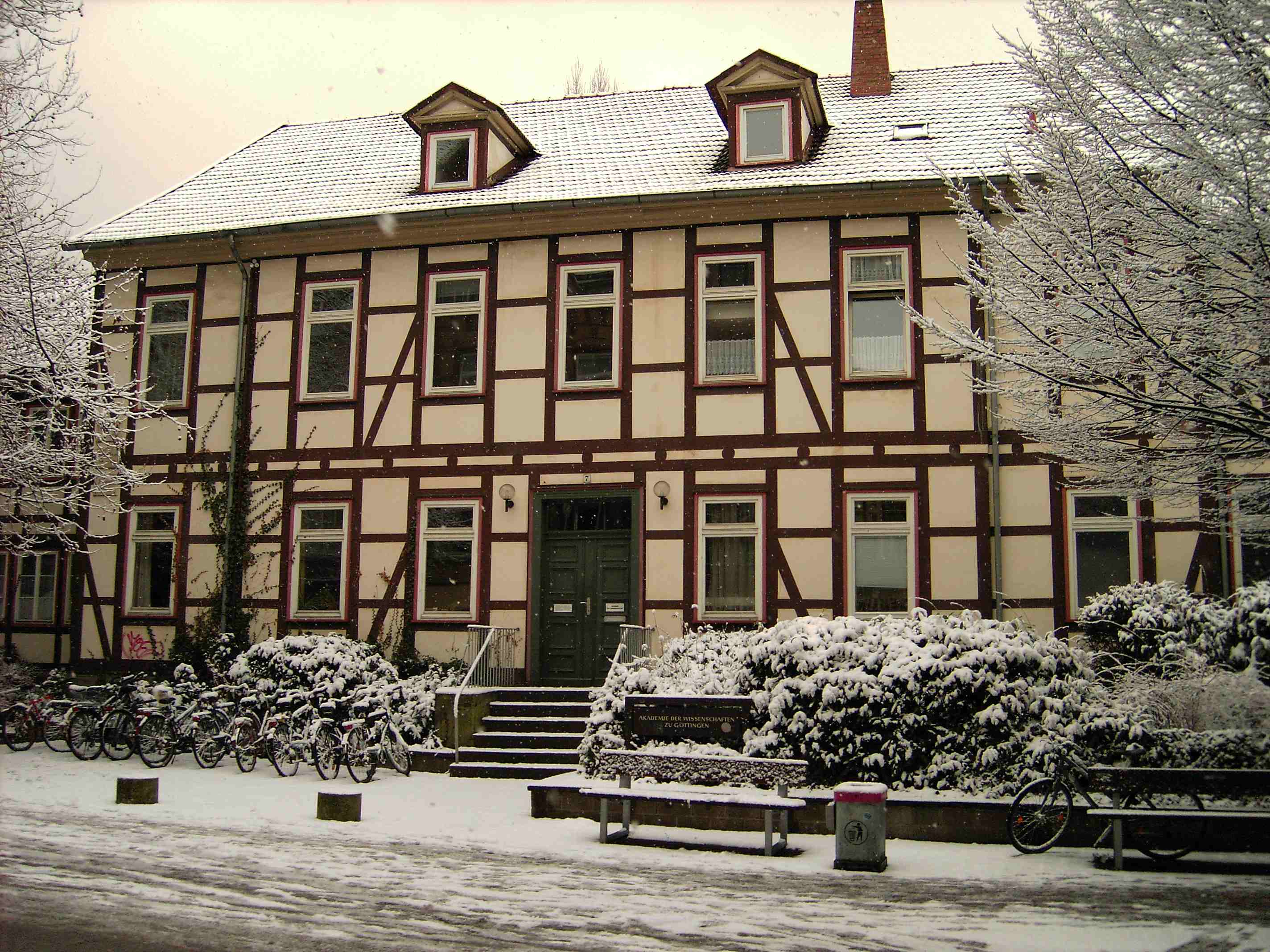 Göttingen, Theaterstr, Gebäude der Akademie der Wissenschaften zu Göttingen. Building of the Academy of Sciences in Göttingen.